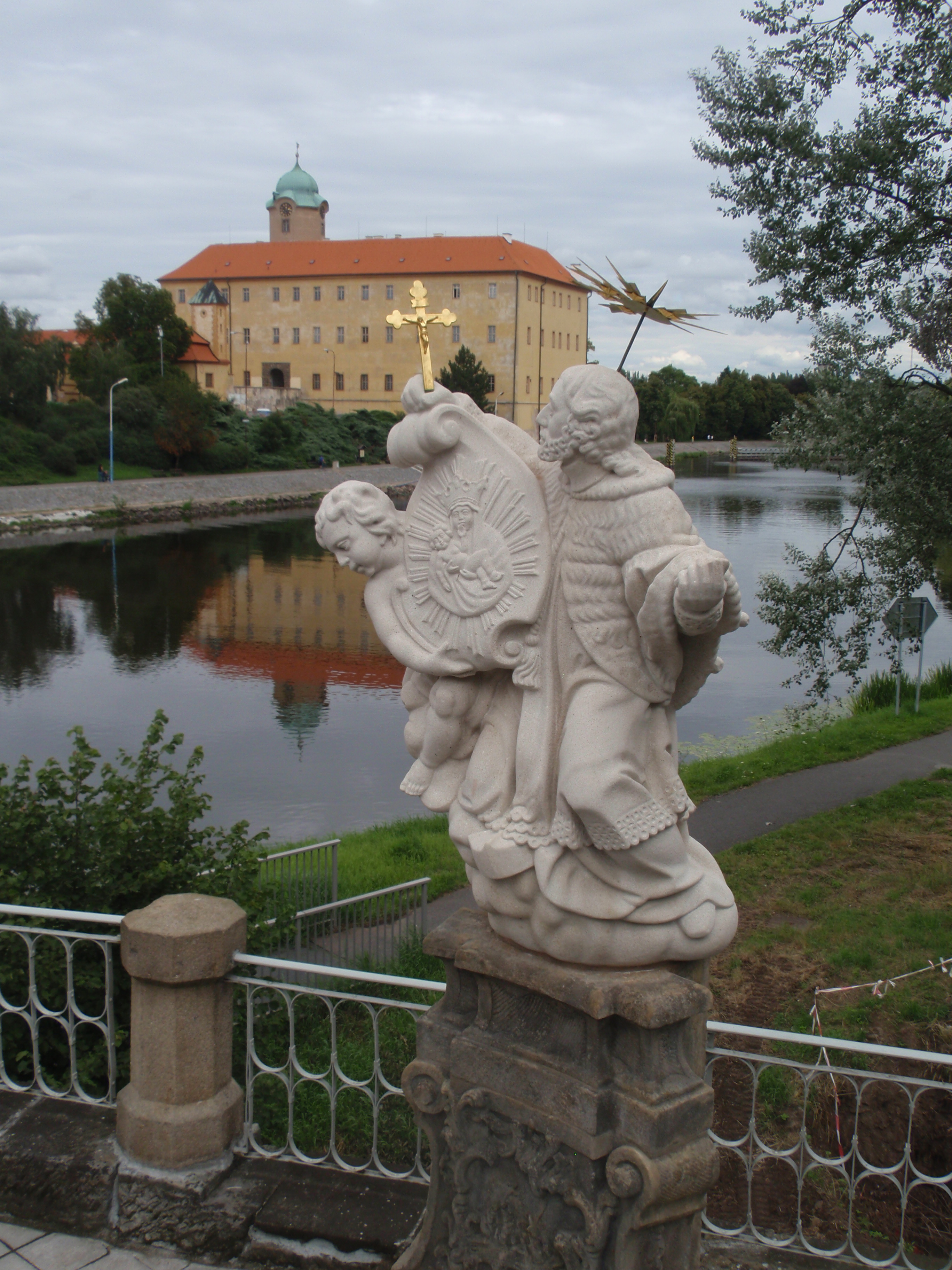 Socha sv. Jana Nepomuckého, u mostu, Poděbrady